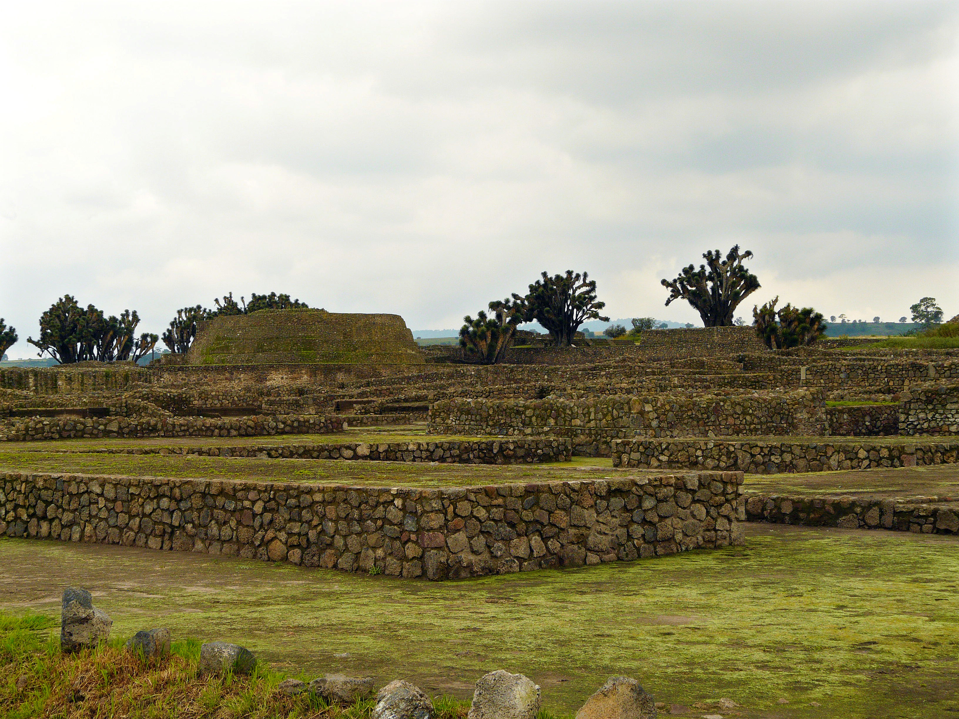 Calpulalpan, Tlaxcala